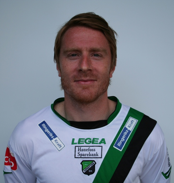 Kjetil Byfuglien, norsk fotballspiller som spiller for Hønefoss Ballklubb.